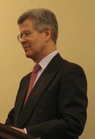 Jean-David Levitte, french ambassador to the USA in early 2007, discussing his trips to American WWII sites in France.